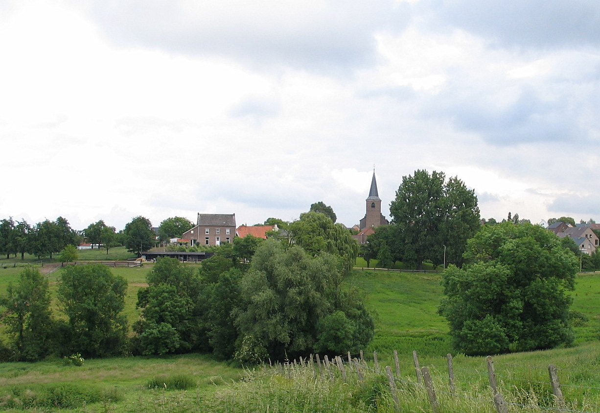 Village of Kerniel, Borgloon in Belgium